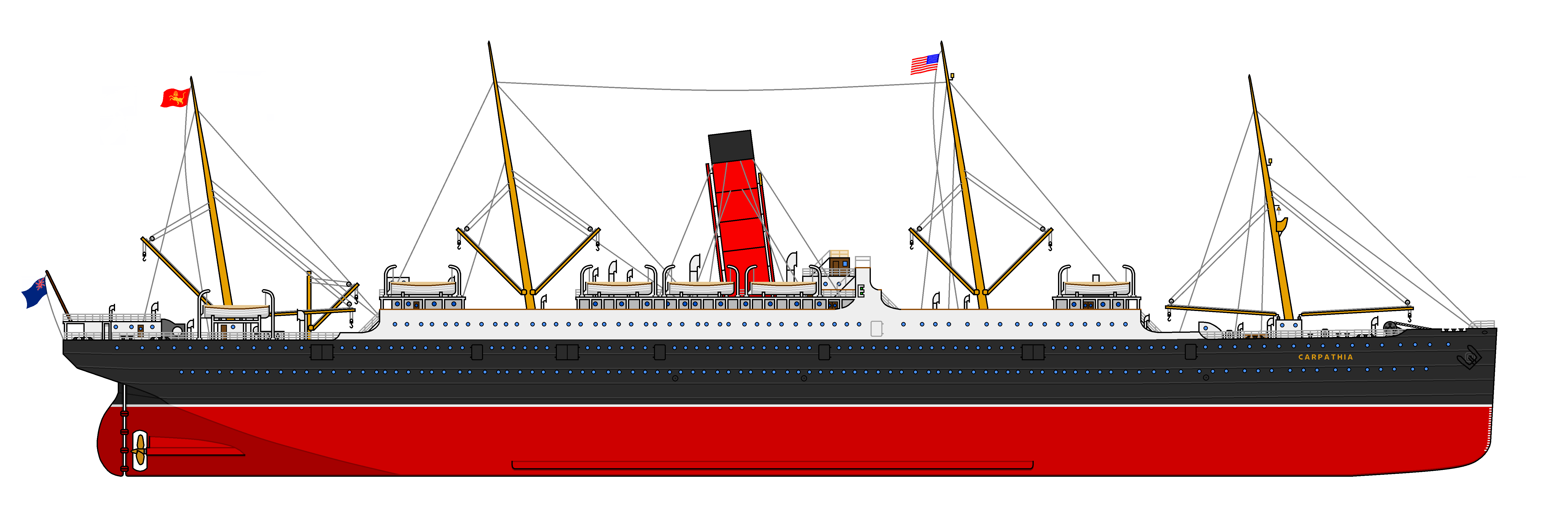 Dibujo del RMS Carpathia.